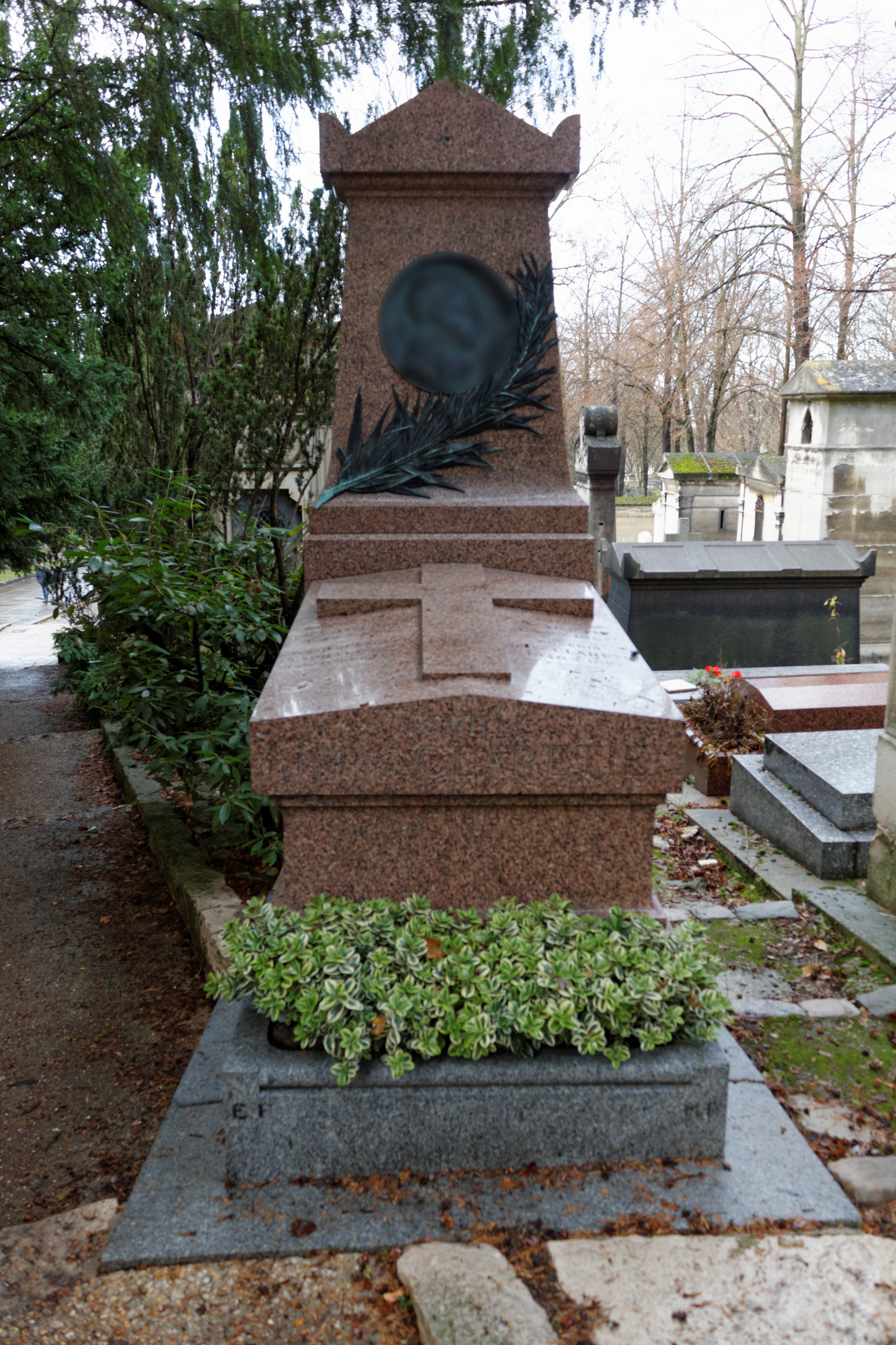 Sépulture de Jules Claretie (1840-1913), romancier, dramaturge, critique dramatique, historien et chroniqueur de la vie parisienne.